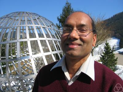 Foto di Shrawan Kumar